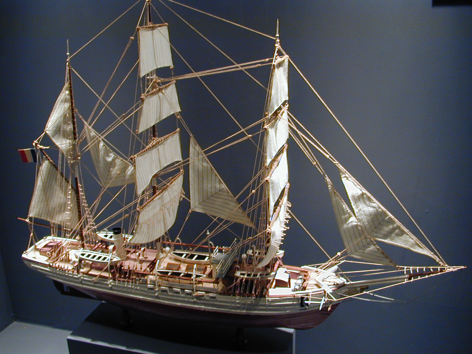 Maquette du navire des expéditions polaires de Jean-Baptiste Charcot, le "Pourquoi pas ? IV".